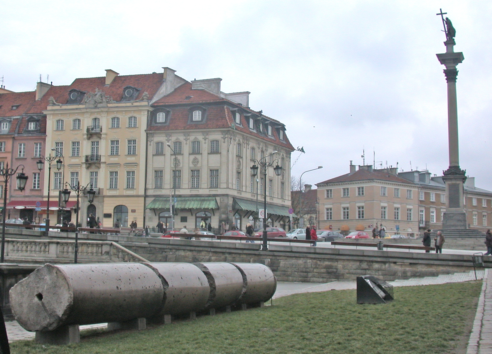 Varsavia, Piazza del Castello Reale (Plac Zamkowy), monumento della Colonna di Sigismondo (Kolumna Zygmunta) e resti di una colonna precedente.